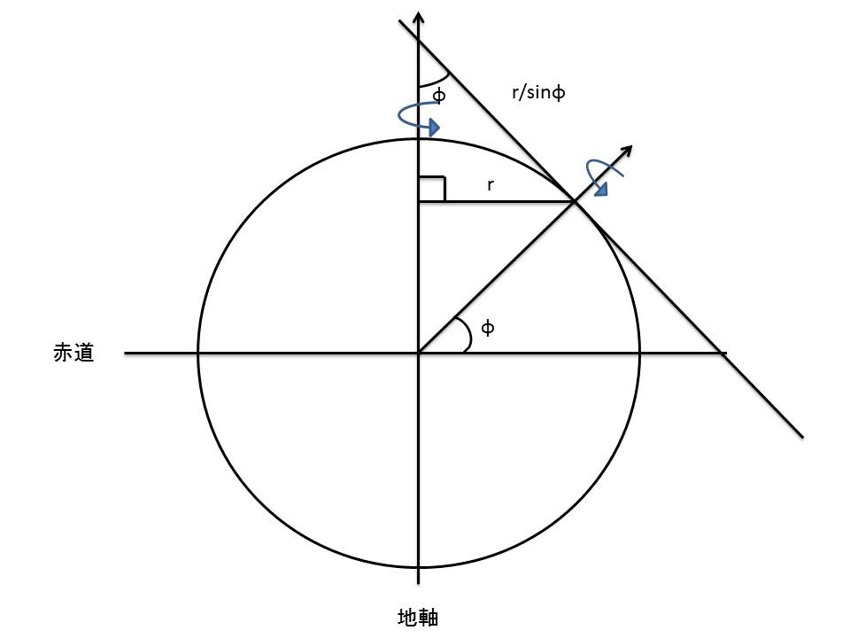 地球でのコリオリ力